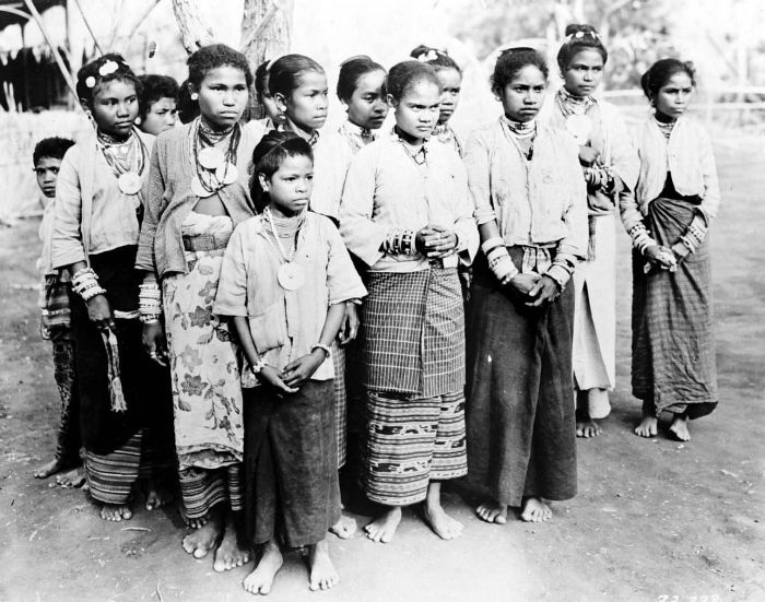 Repronegatief. Groep Timorese danseressen uit Tjamplong